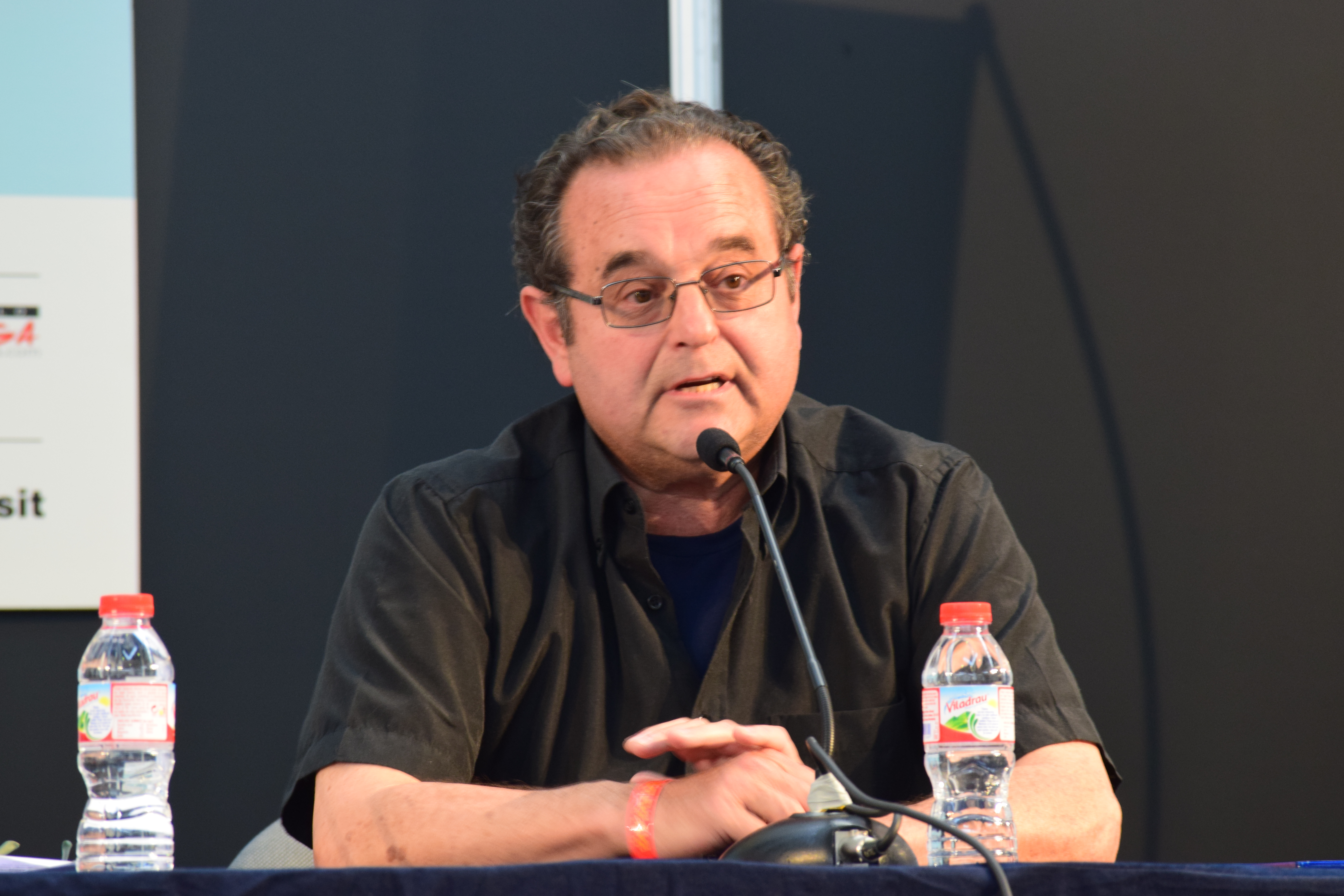 El dibuixant Jaume Rovira i Freixa parlant a la taula rodona Les últimes sèries de Bruguera durant el 34è Saló Internacional del Còmic de Barcelona (2016).